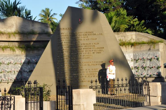 Concepto de Revolución legado que dejó el Comandante en Jefe Fidel Castro